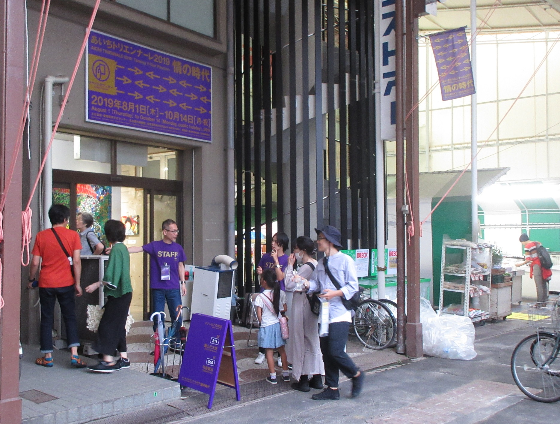 円頓寺本町商店街の一角。「あいちトリエンナーレ2019」の会場となった。